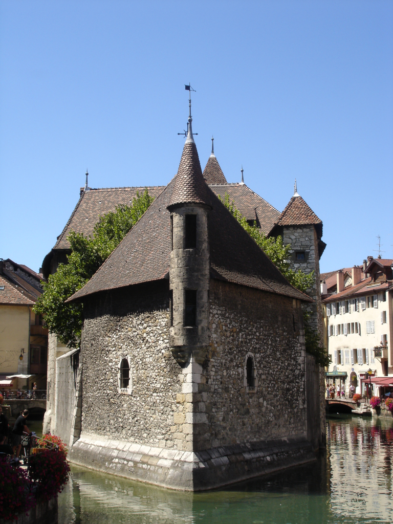 Photographie du Palais de l'Isle à Annecy dans la vieille ville à l'été 2005 Auteur : Nicolas Champavert Licence